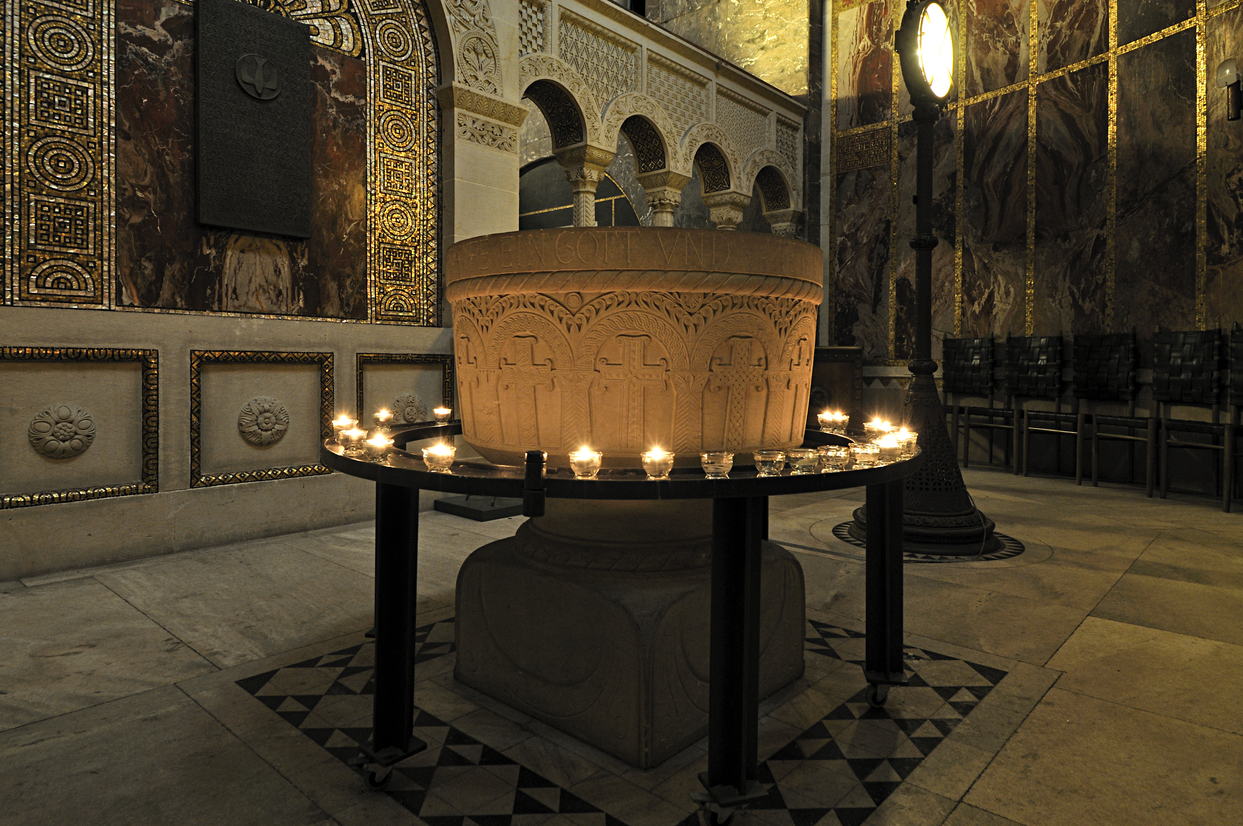 Erlöserkirche Bad Homburg: Taufbecken in der Apsis